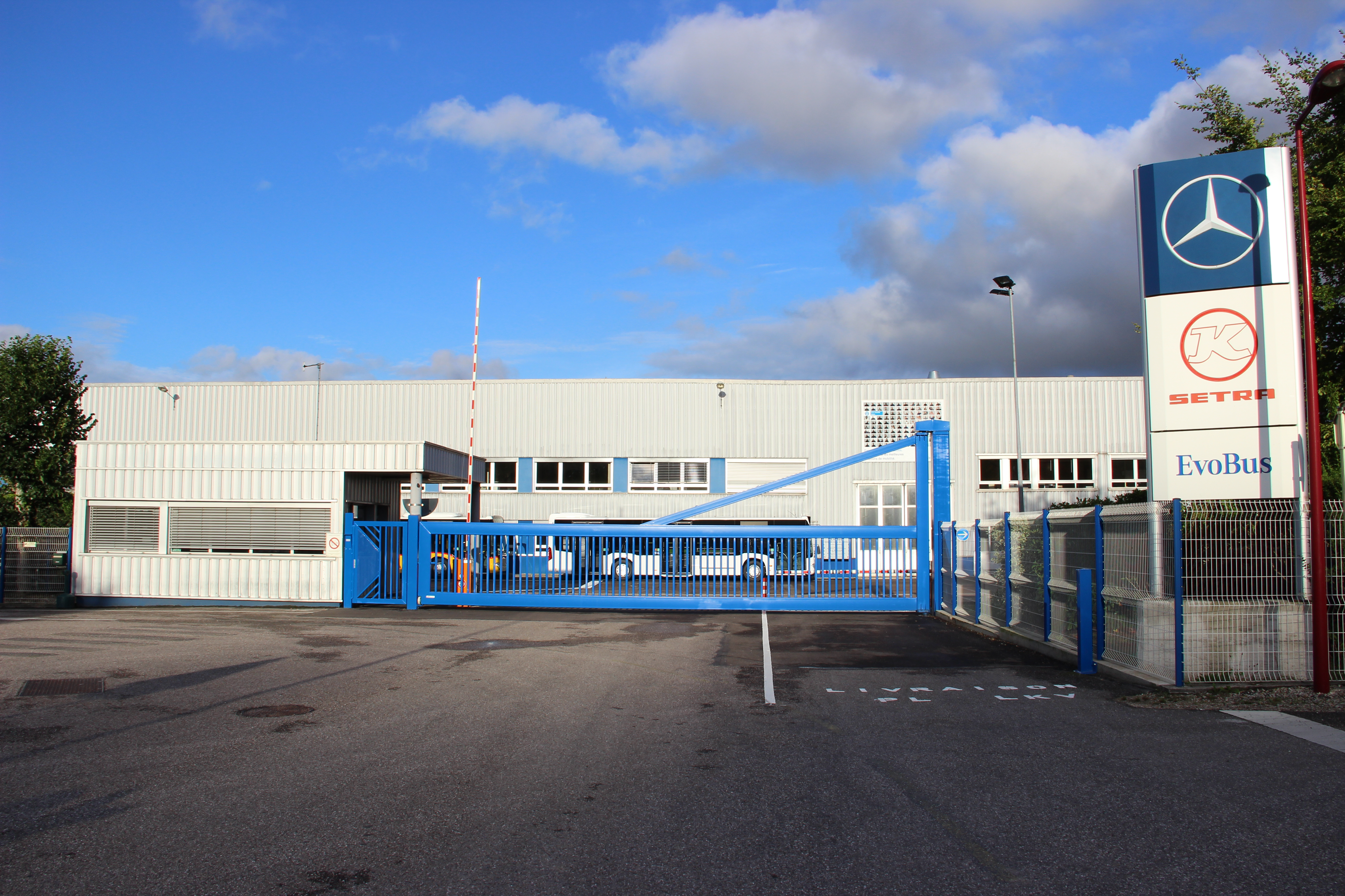 L'usine Evobus de Ligny-en-Barrois (55), site d'assemblage du Mercedes-Benz Citaro